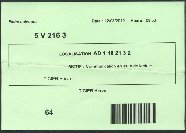 Exemple de fiche suiveuse que le système documentaire Thot produit et gère en association avec un fantôme à chaque consultation d'un article aux Archives départementales d'Ille-et-Vilaine (15 x 21 cm).